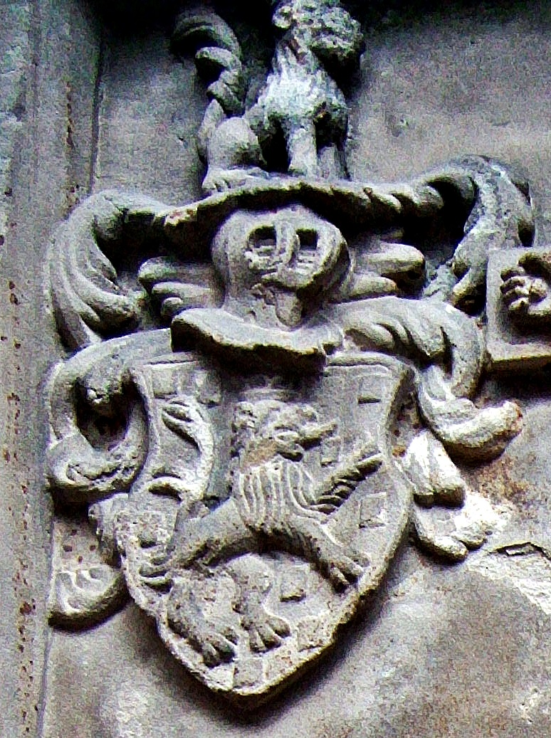 Wappen der Brenner von Löwenstein, Detail vom Epitaph des Wilhelm von Löwenstein (+ 1579), St. Ulrich, Deidesheim